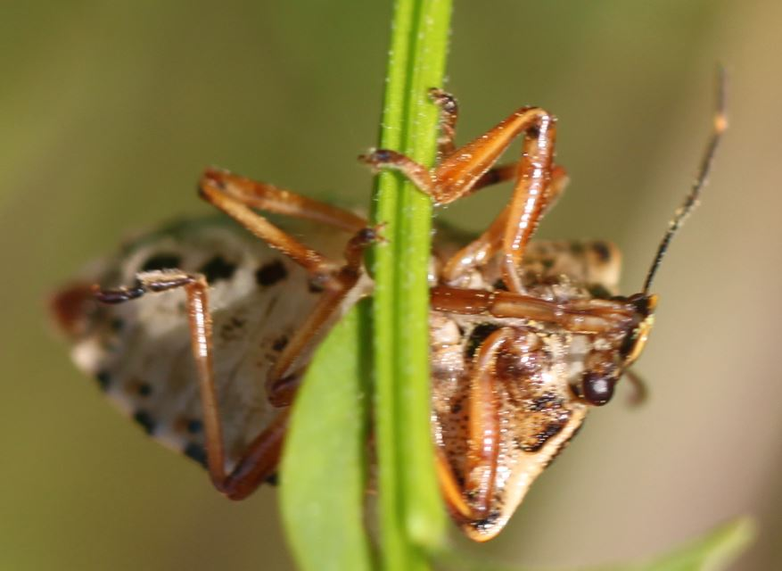 Baumwanze Pinthaeus sanguinipes an Besenginster am 6. Juni 2018 in der Schwetzinger Hardt